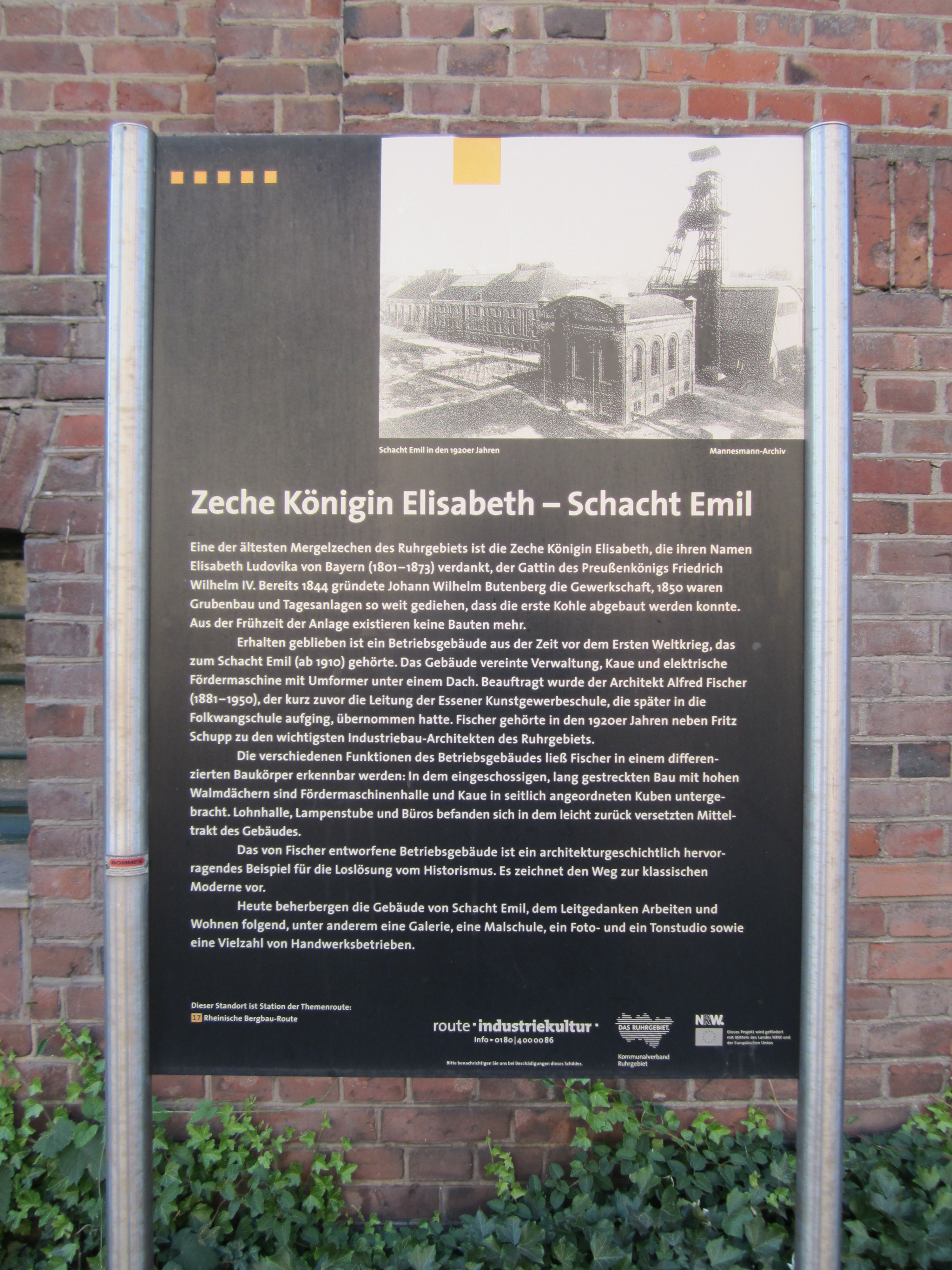 Informationstafel der Route Industriekultur am Schacht Emil der Zeche Königin Elisabeth in Essen-Frillendorf